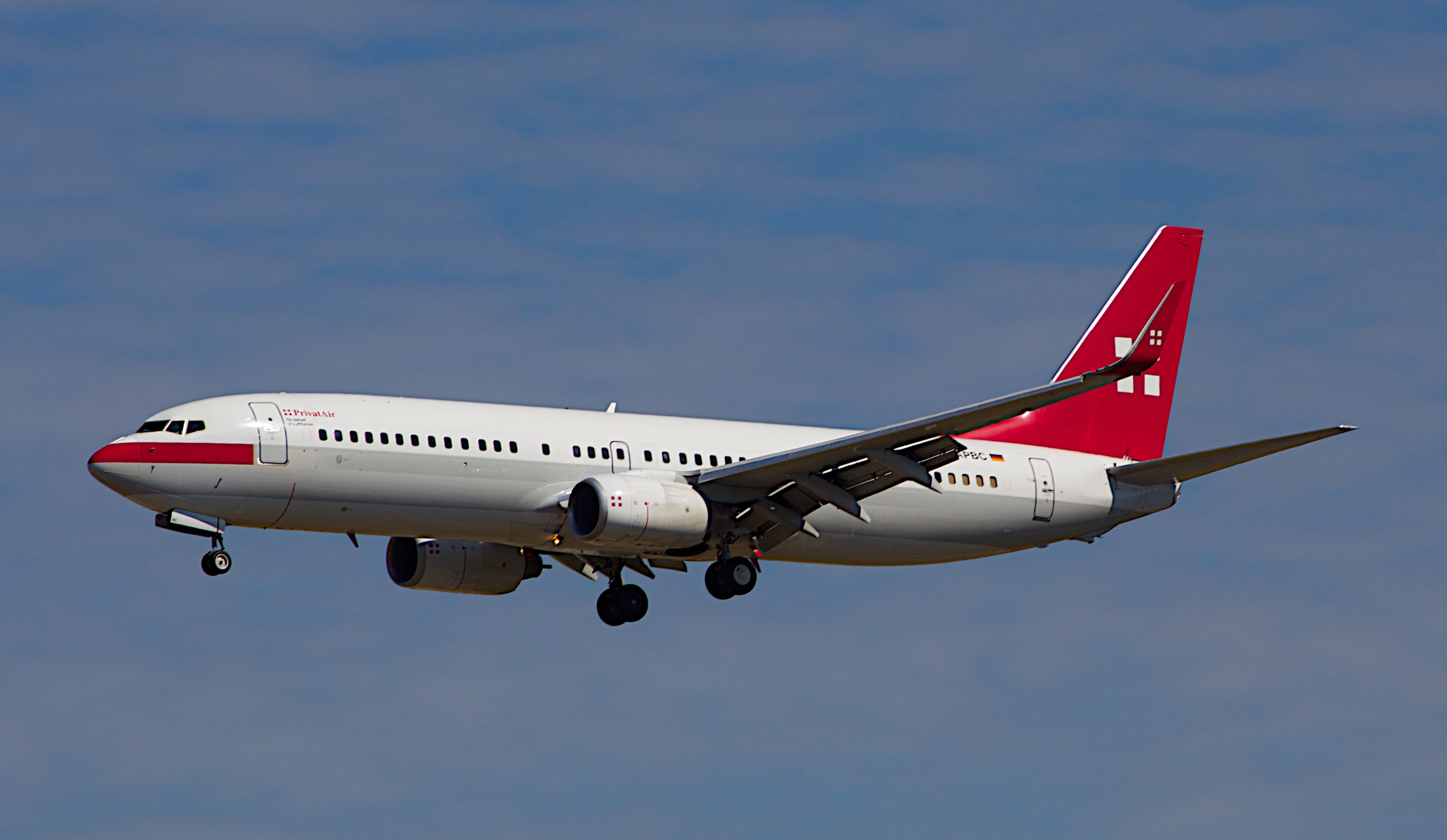 Privatair landet in Frankfurt.